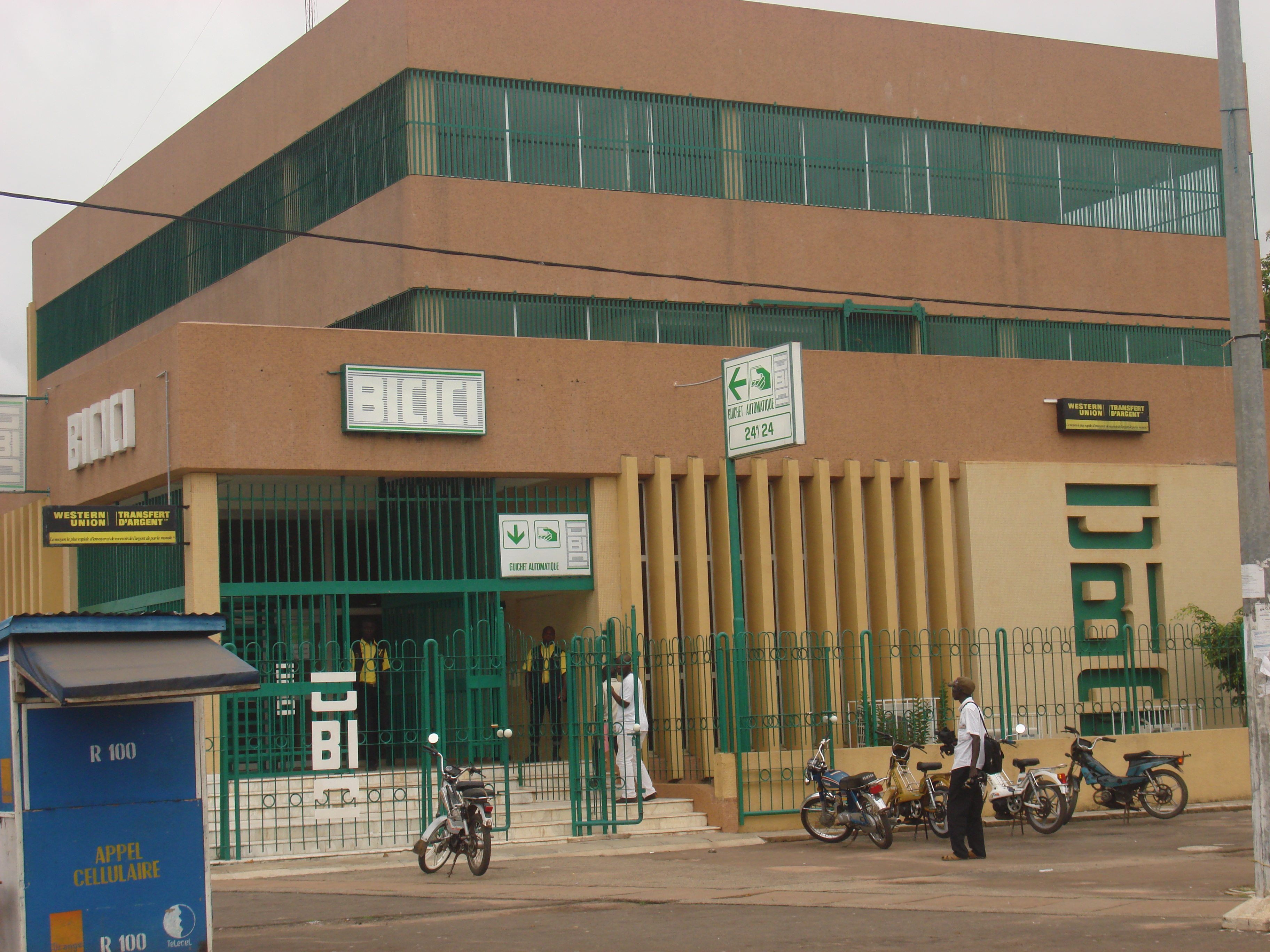 Agence de Bouaké, quartier commerce, de la Banque internationale pour le commerce et l'industrie en Côte d'Ivoire (BICICI)